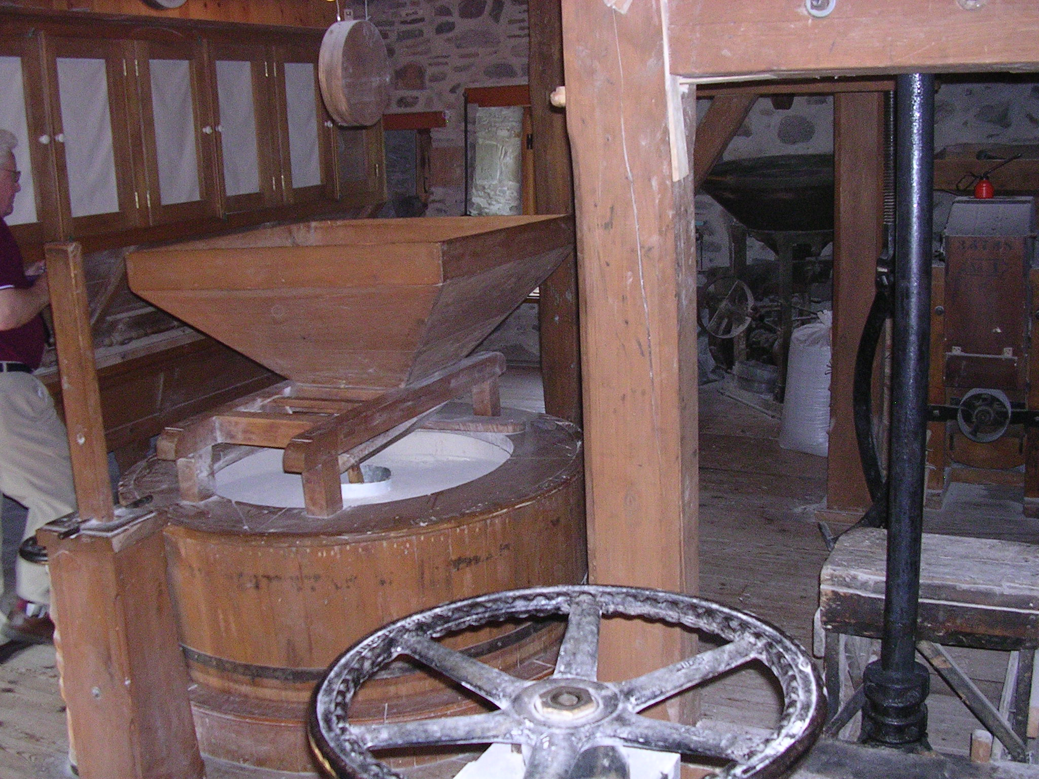 Moulange et bluteau du moulin Michel, de Gentilly, à Bécancour (Québec); moulin à eau; moulin à farine